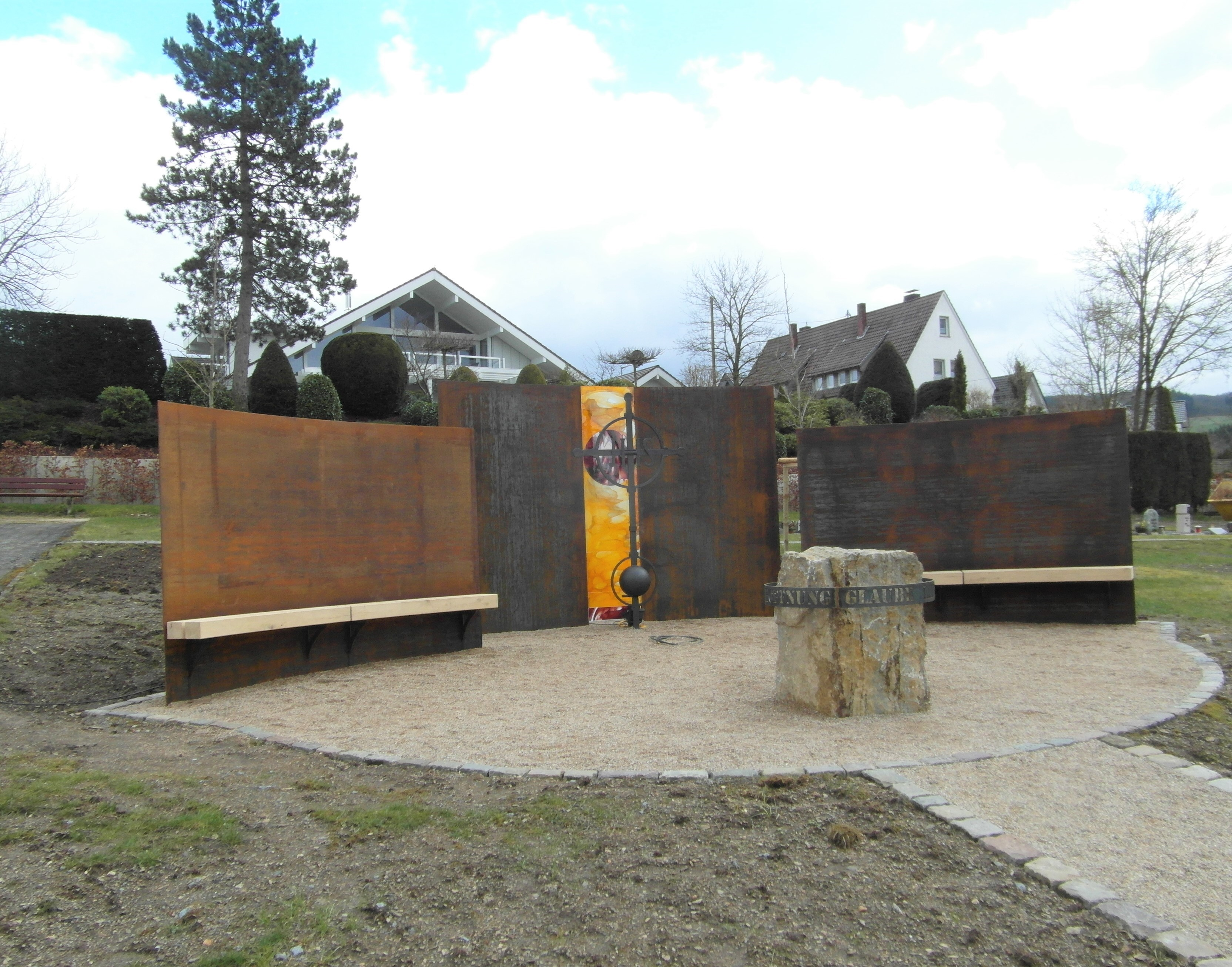 Anfang März 2020 vom Kirchenvorstand im Rahmen einer Neugestaltung des Friedhofs vorgestelltes modernes Ensemble aus verschiedenen Elementen